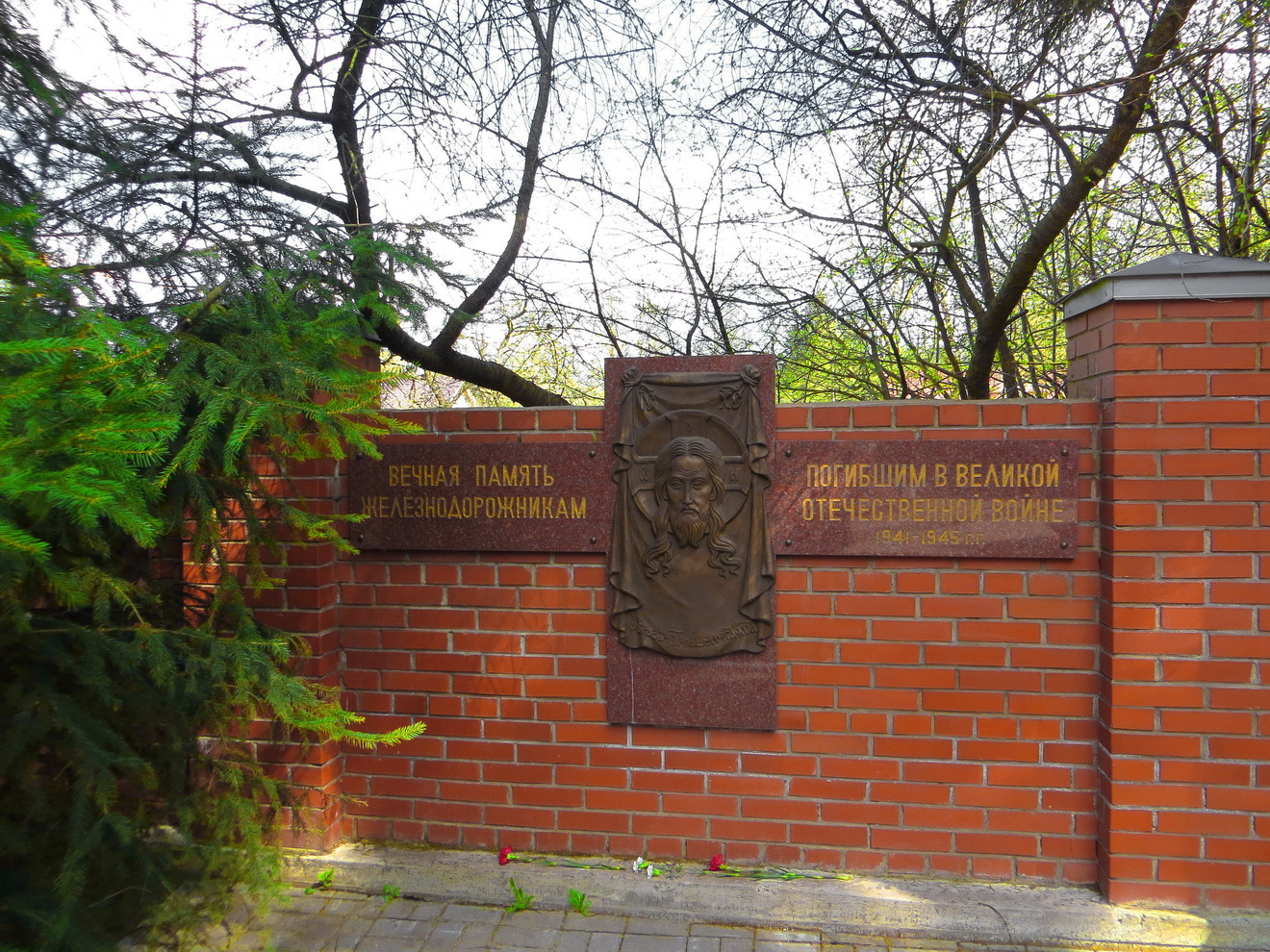 Мемориальная доска на ограде храма Спаса Нерукотворного Образа на Дороге жизни в память железнодорожников погибших в годы войны на Дороге жизни.